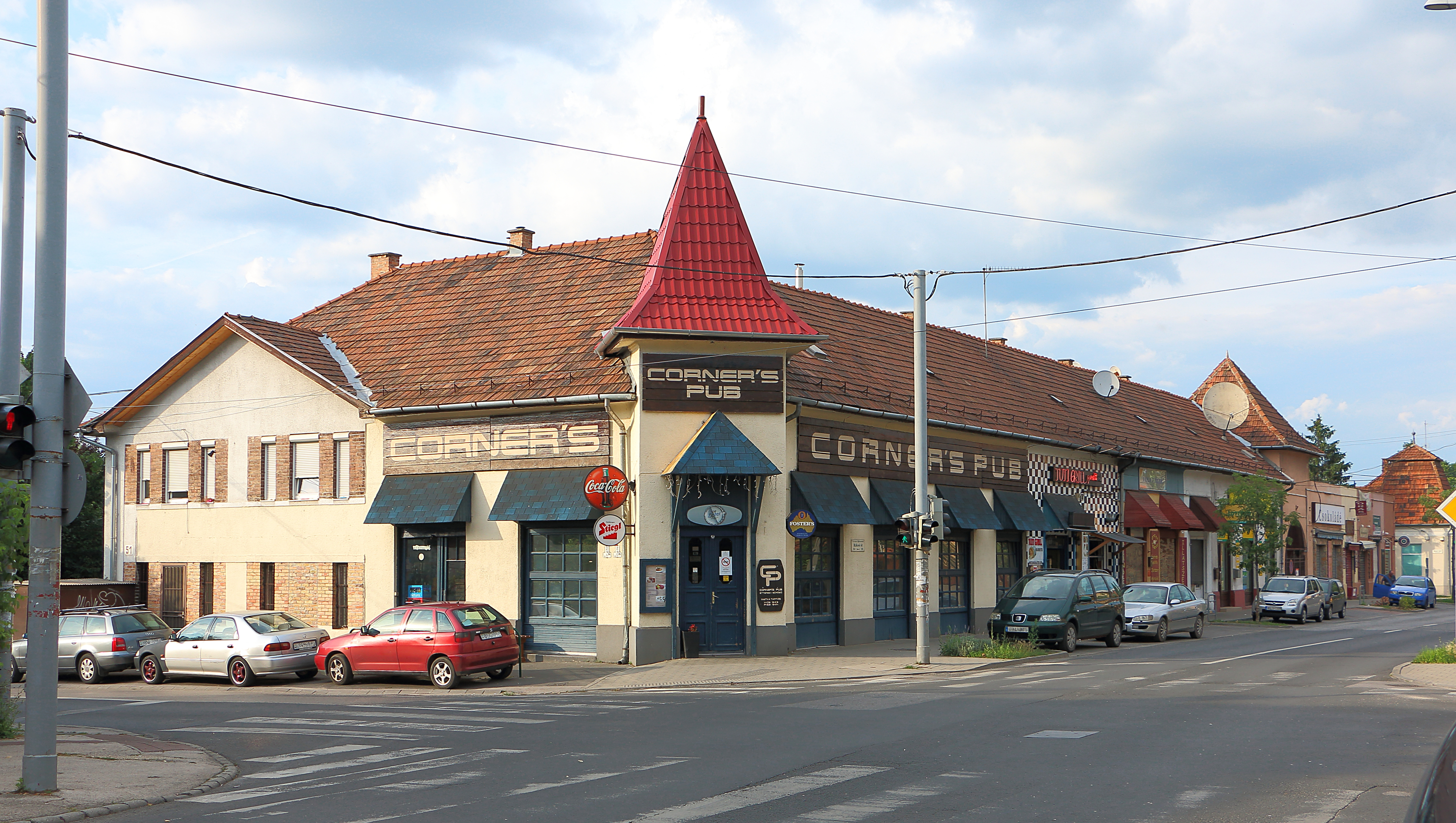 A Harcsa-sor a Corner's Pub (megnyitásakor Otthon kávézó) felől. A József utca és Rákosi út sarkán álló vendéglátóhely épülete már korábban is létezett, eleinte kisdedóvó, majd kávéház volt. Rákosi út 114-116. Építtető: Harcsa Béla, Építő: Poros István Építés éve: 1927 2000 óta helyi védettség alatt áll.